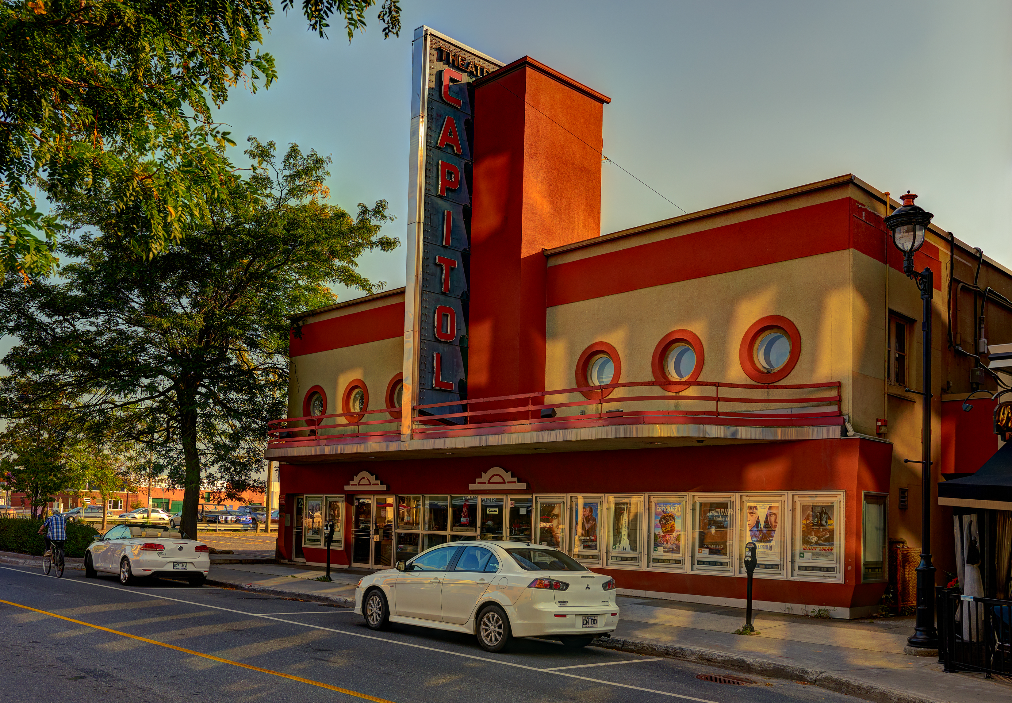 Cinéma Capitol, 253, rue Lindsay, Drummondville (Canada). (Protection IP cité. Voir la liste des lieux patrimoniaux du Centre-du-Québec pour plus de détails).